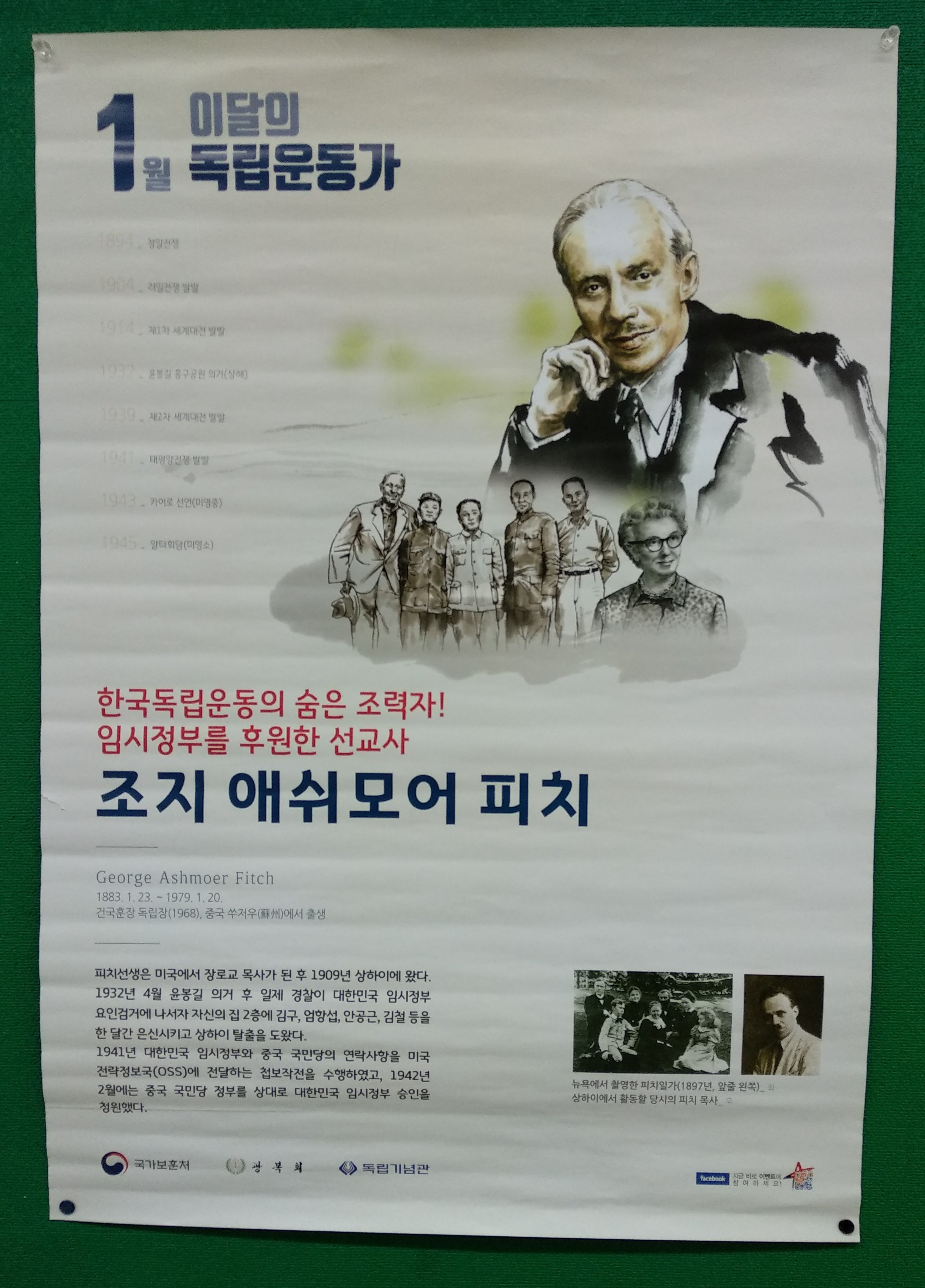 조지 애쉬모어 피치, 2018년 1월 이 달의 독립운동가